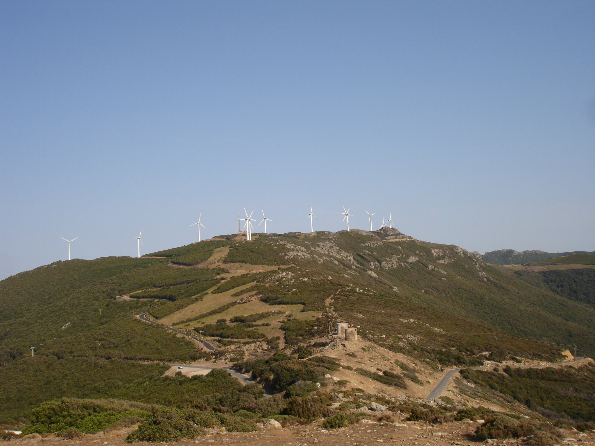 France, Haute-Corse (2B), Ersa, champ d'éoliennes